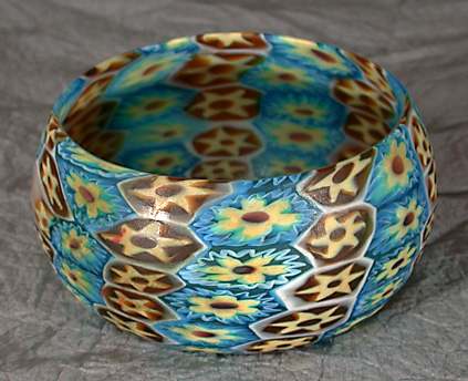 Fratelli Toso Bowl, ca. 1910